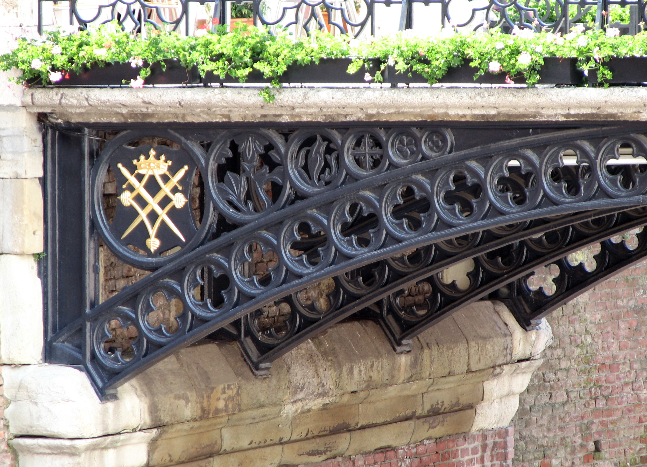 Sibiu/hermannstadt, Podul Mencielor.